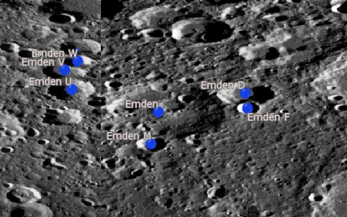 Cráter lunar Emden. Cráteres satélite. (Imagen LROC)